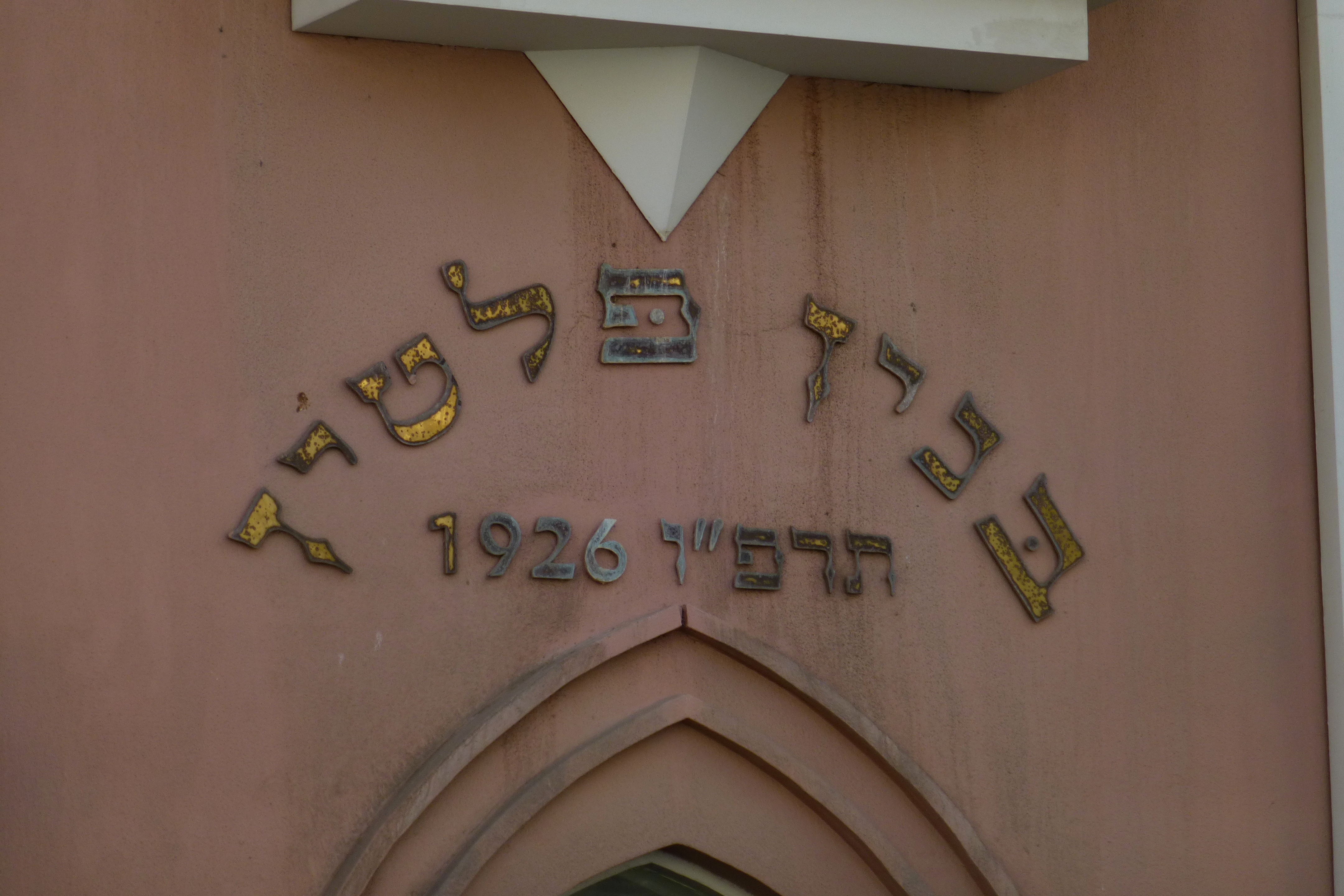 מלון פלטין הוא בניין בתל אביב, בפינת רחוב אחד העם ורחוב נחלת בנימין. הבניין פעל בעבר כבית מלון וכיום משמש כבניין משרדים. בשנות העשרים של המאה ה-20 הוזמן האדריכל אלכסנדר ברוולד, מחשובי האדריכלים בתקופת היישוב, לתכנן מלון יוקרתי עבור אהרון מאיר מזיא וחתנו, צבי איזקסון, במרכז העיר הצעירה תל אביב. בשנת בנייתו, 1926, תחת ניהולה של משפחת שלוסברג (הוריה של לאה רבין ואביבה יפה, אשתו של אברהם יפה), נחשב למלון המרכזי, החדשני והמפואר בעיר.